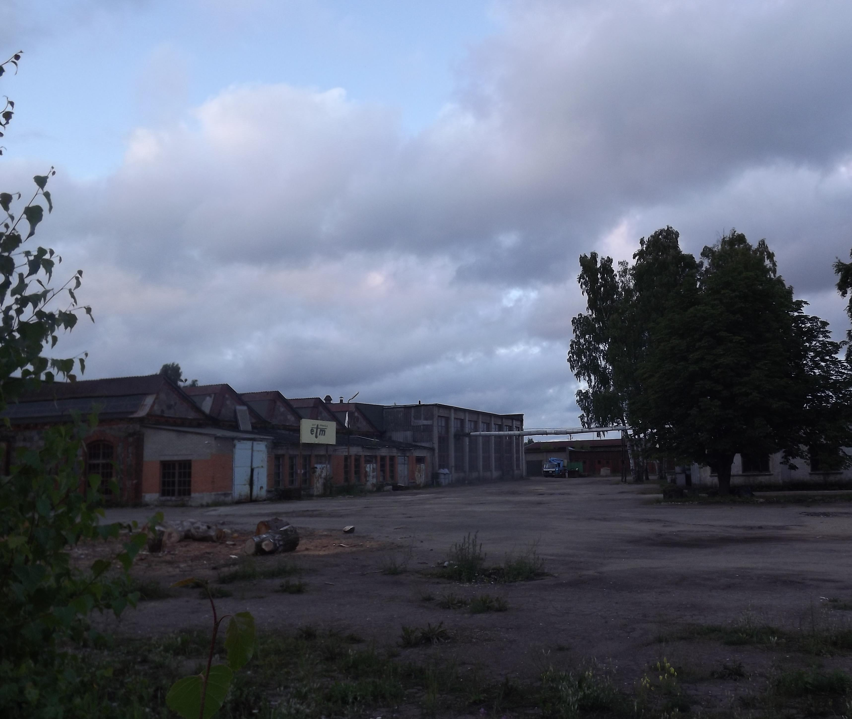 Raudteetehas